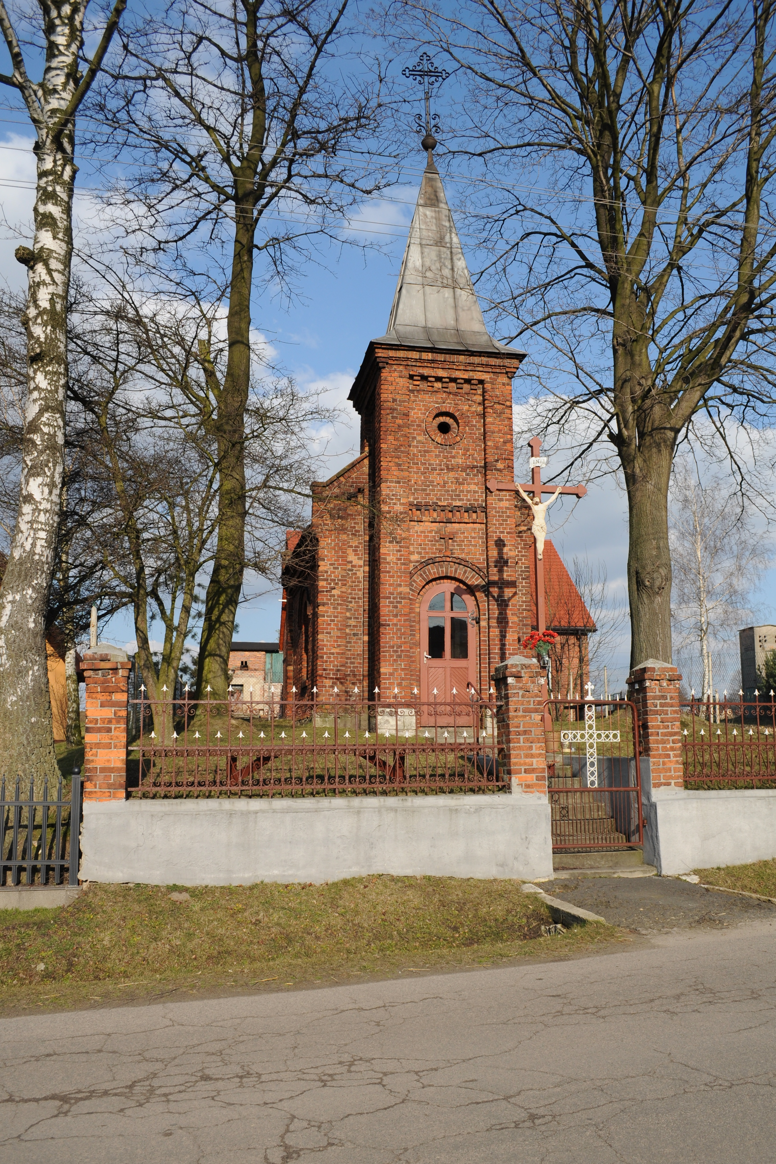 Łubki. Neogotycka kaplica.